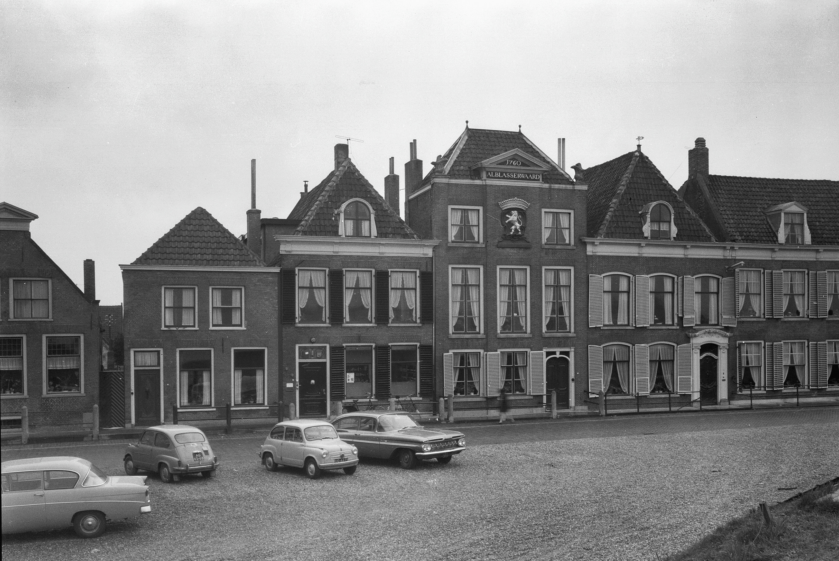 gevels